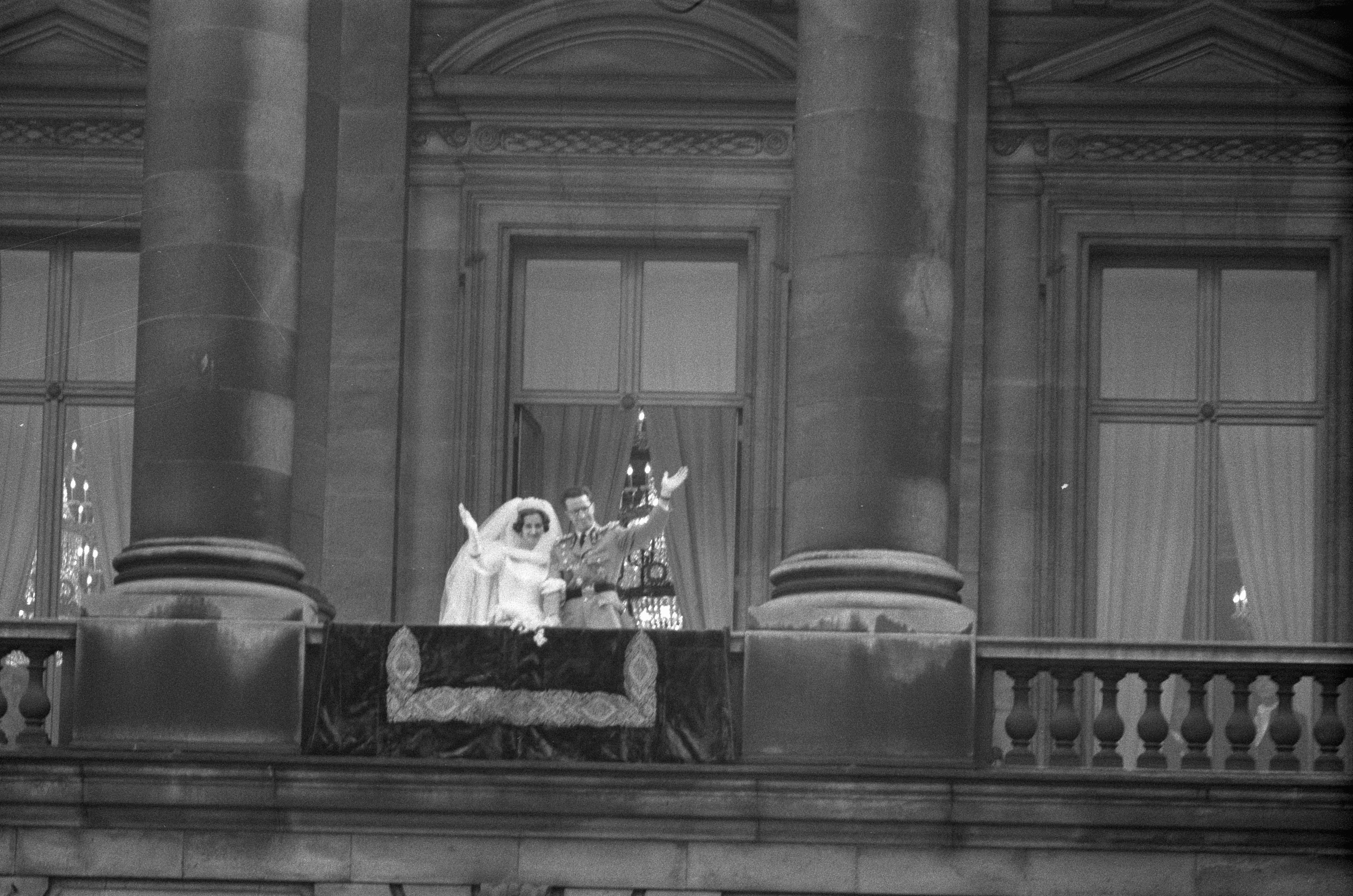 Collectie / Archief : Fotocollectie Anefo Reportage / Serie : [ onbekend ] Beschrijving : Vorstelijk huwelijk te Brussel, Boudewijn en Fabiola op het balkon Datum : 15 december 1960 Locatie : Brussel Trefwoorden : Vorstelijk, balkons, huwelijken Persoonsnaam : Boudewijn, Fabiola, koningin van België Fotograaf : Pot, Harry / Anefo Auteursrechthebbende : Nationaal Archief Materiaalsoort : Negatief (zwart/wit) Nummer archiefinventaris : bekijk toegang 2.24.01.05 Bestanddeelnummer : 911-8786